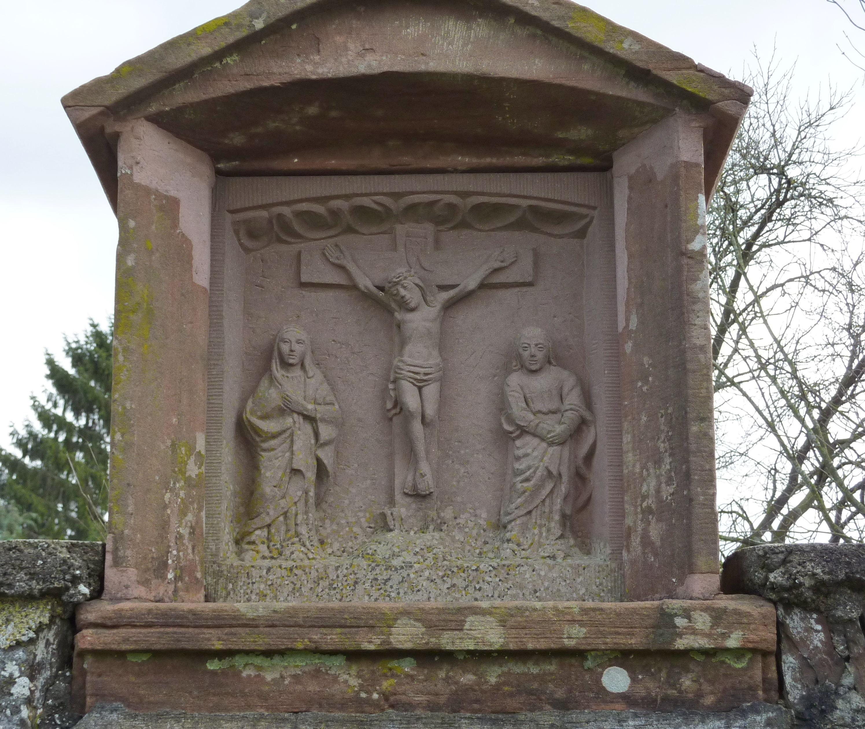 Kreuzweg um die Wallfahrtskirche Mater Dolorosa in Driesch, Ortsteil von Lutzerath, 1755 von Johann Nilles (Wittlich) aus rotem Sandstein gehauen